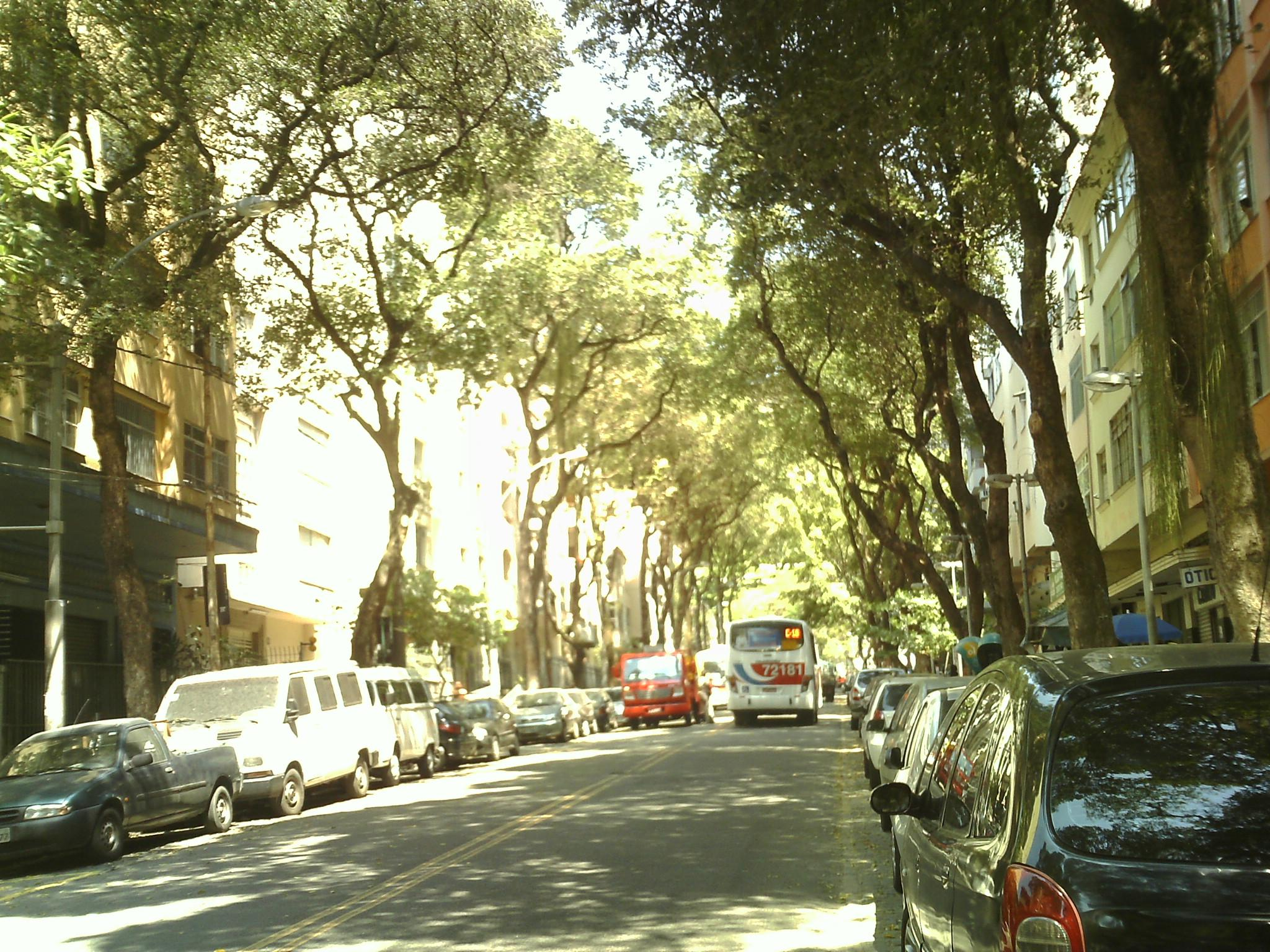 Bairro de Fátima.